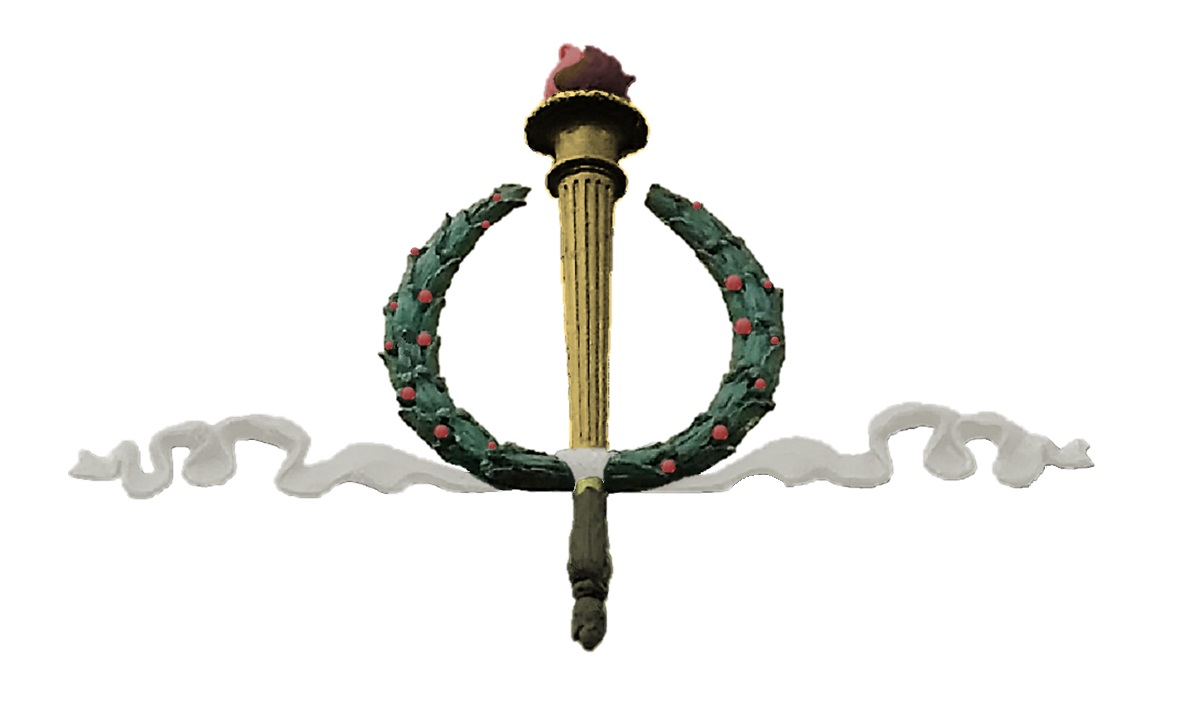 Emblema de la Escuela Bejamin Harrison de Cayey, Puerto RIco